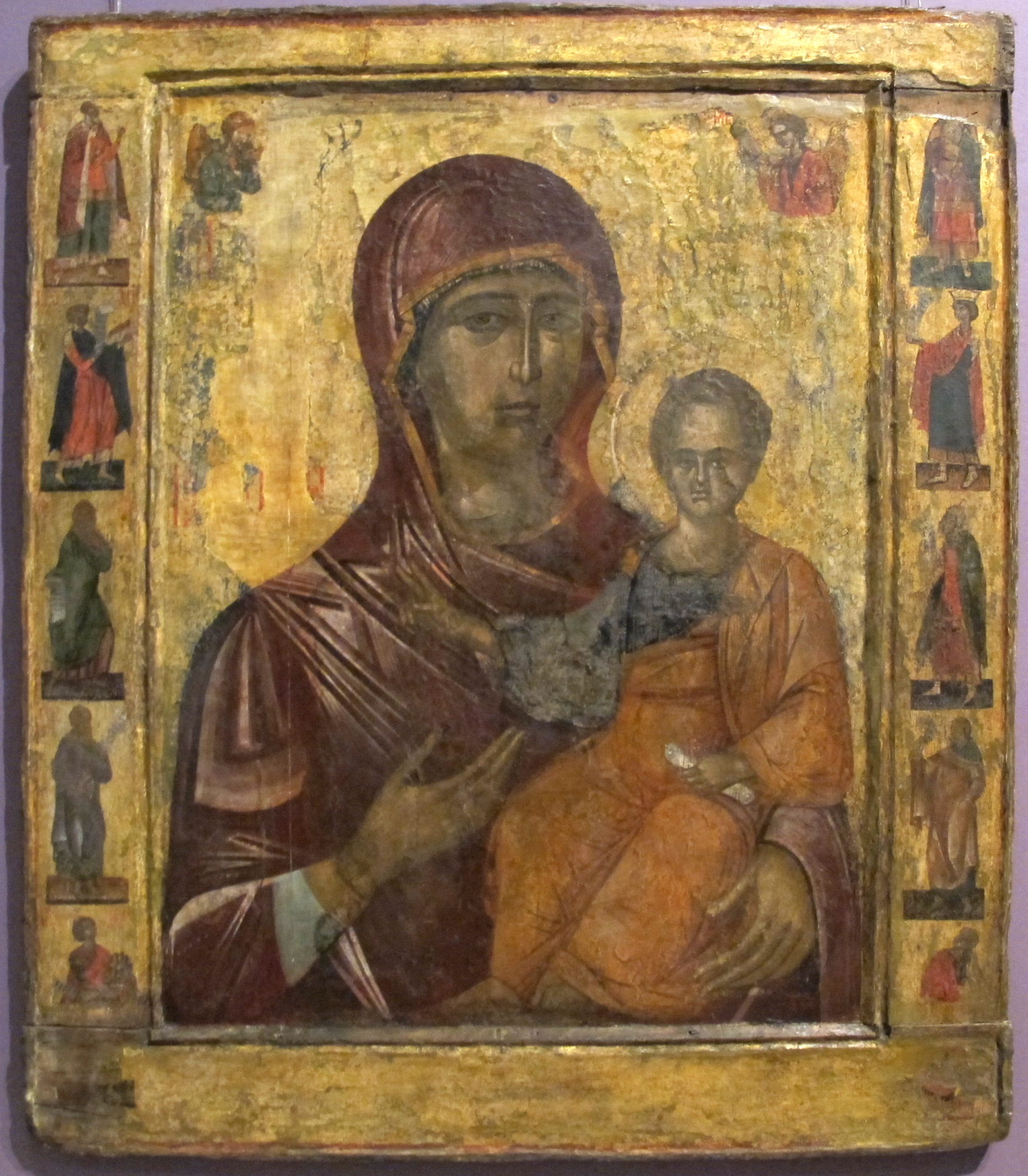 Vallacchia, icona processionale con madonna hodegetria tra profeti, 1512-13, da vallacchia